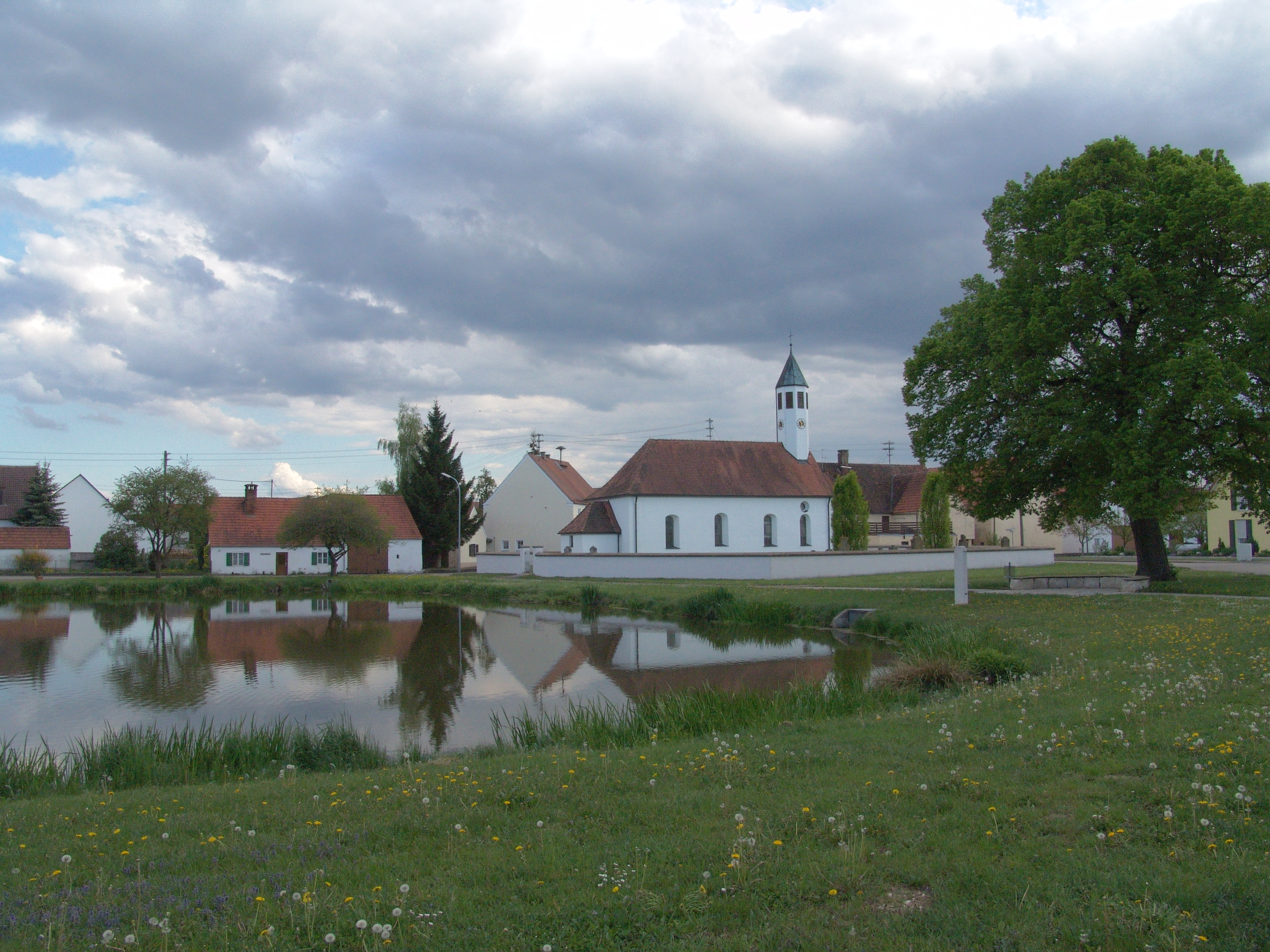 evang.-luth. Kirche St. Leonhard in Schwörsheim